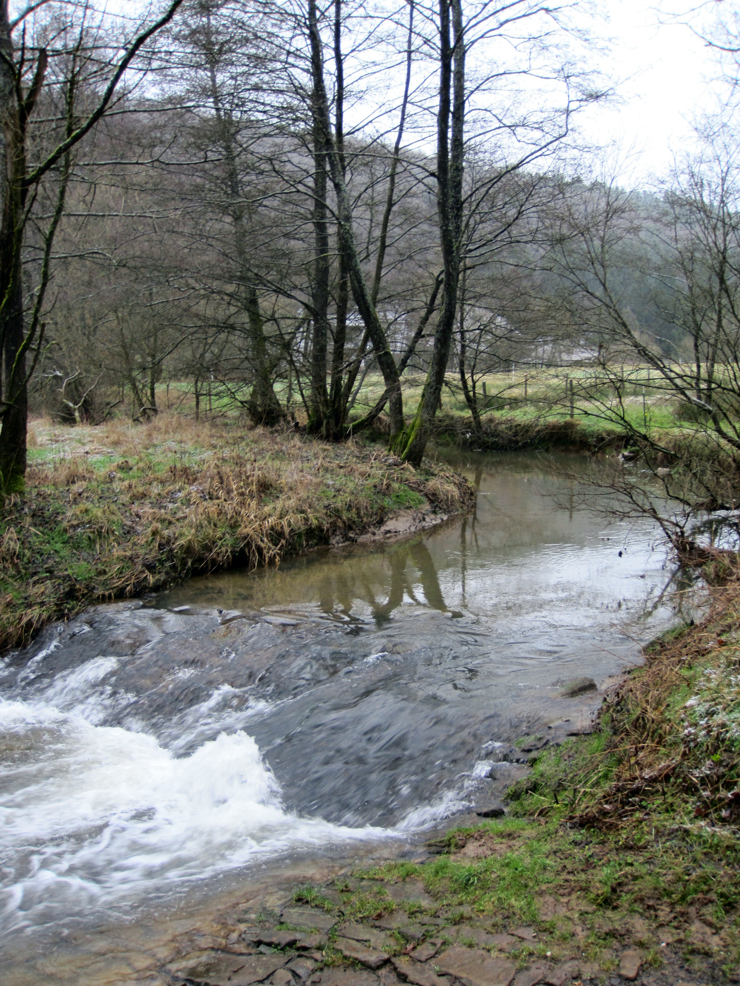 Mehrbach - Blick Richtung Mehren